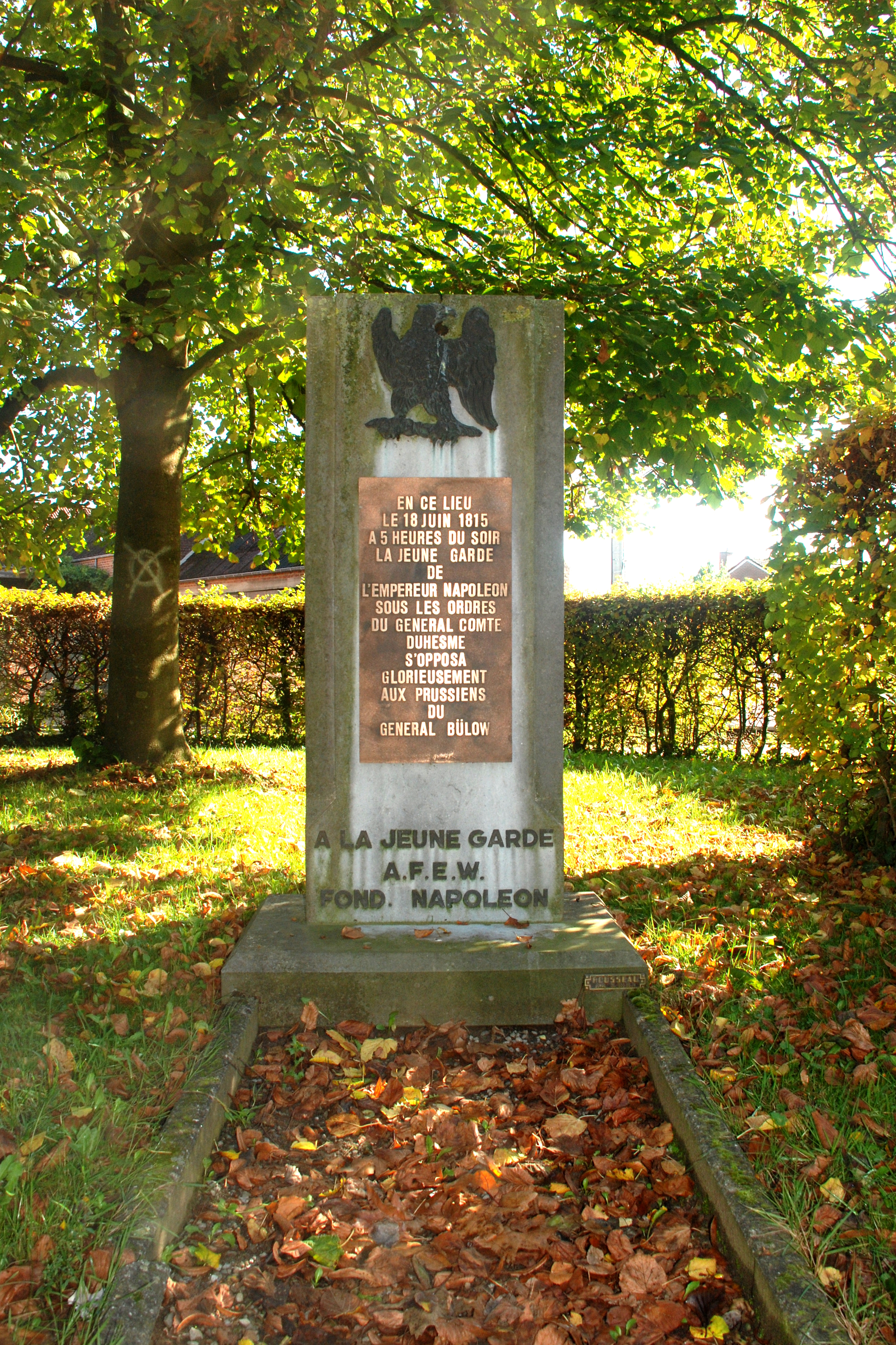 Belgique - Brabant wallon - Lasne - Plancenoit - Stèle à la Jeune Garde (bataille de Waterloo, combats de Plancenoit)